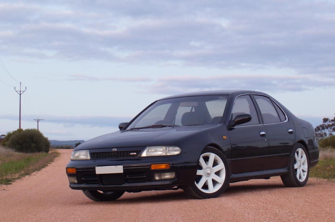 Nissan U13 Bluebird SSS ATTESA